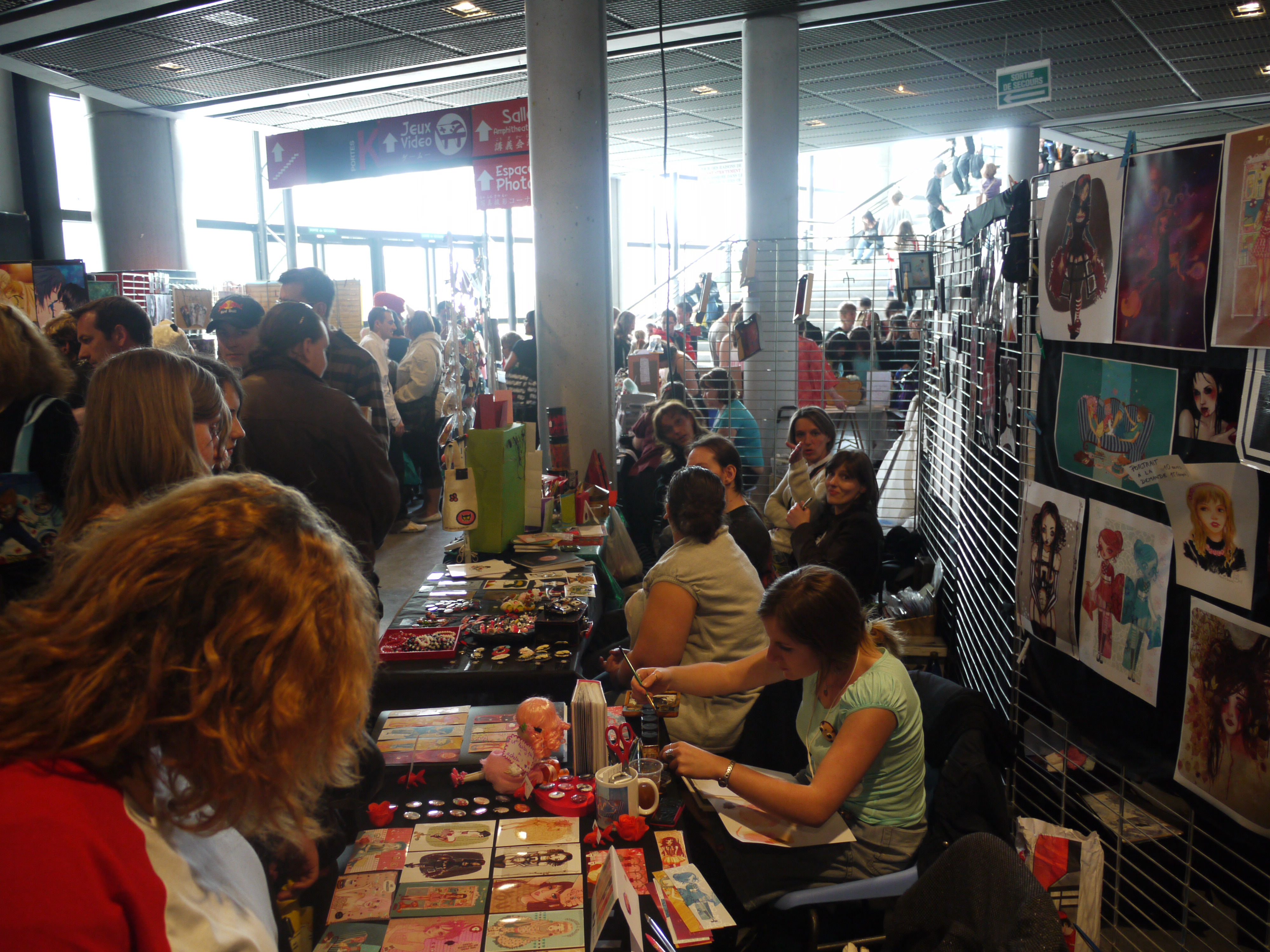 Un Stand Amateur au festival Mang'Azur 2009 de Toulon.